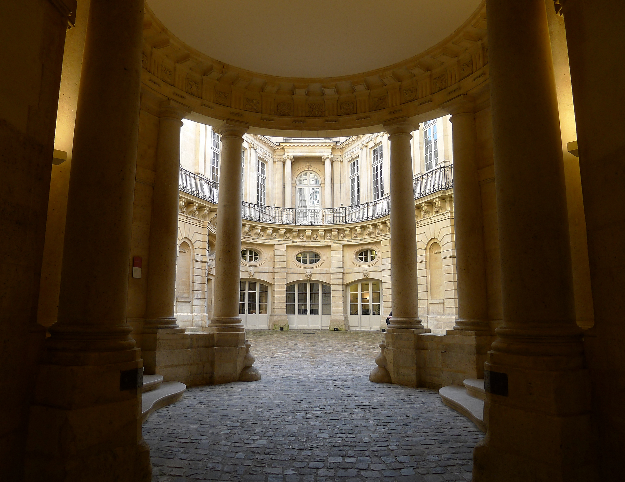 Hôtel de Beauvais (cour intérieure vue du péristyle de l'entrée) - Paris IV